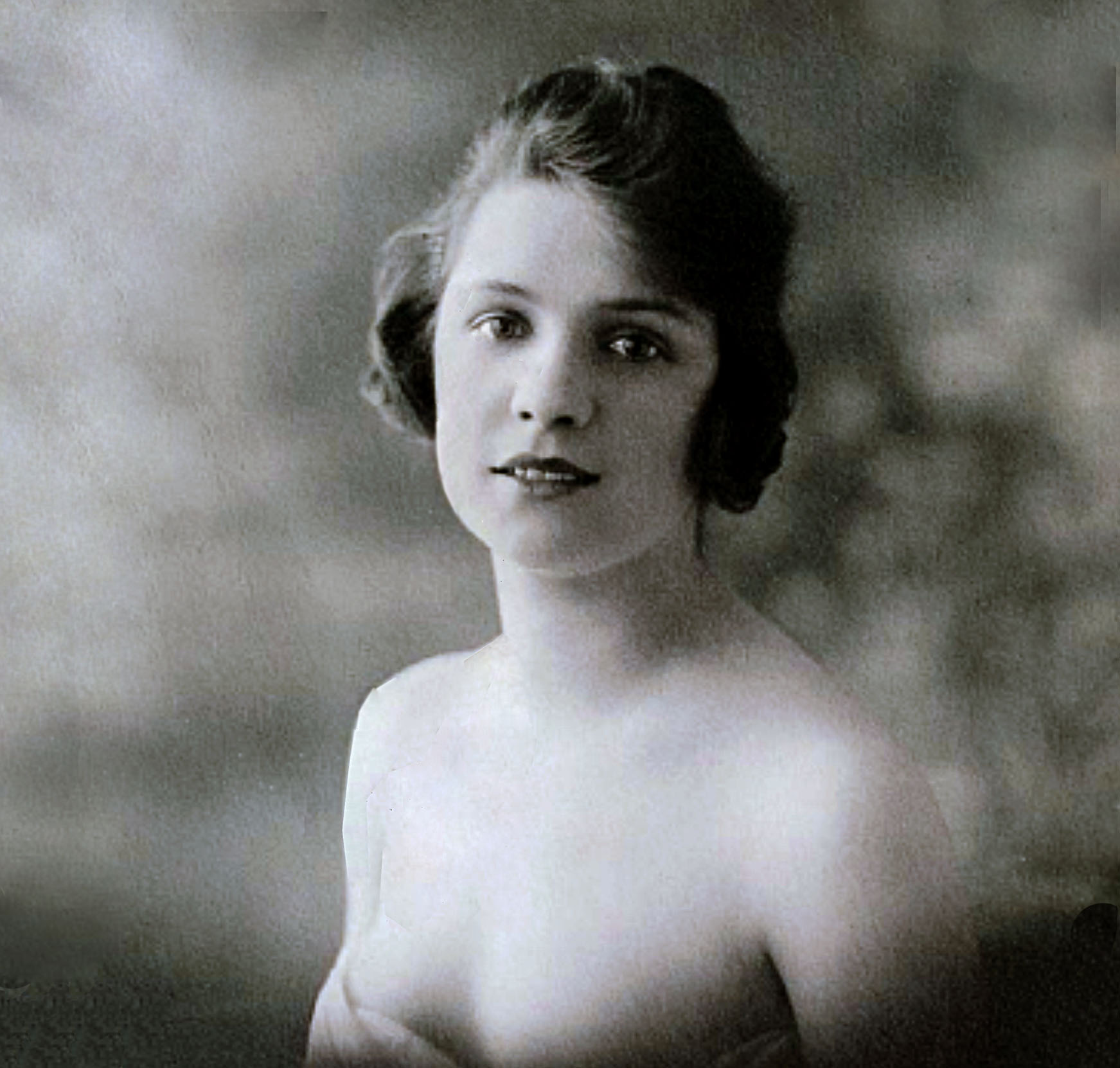 Germaine Larbaudière 1890-1931 actrice de théâtre petite amie de Curnonsky pendant 20 ans